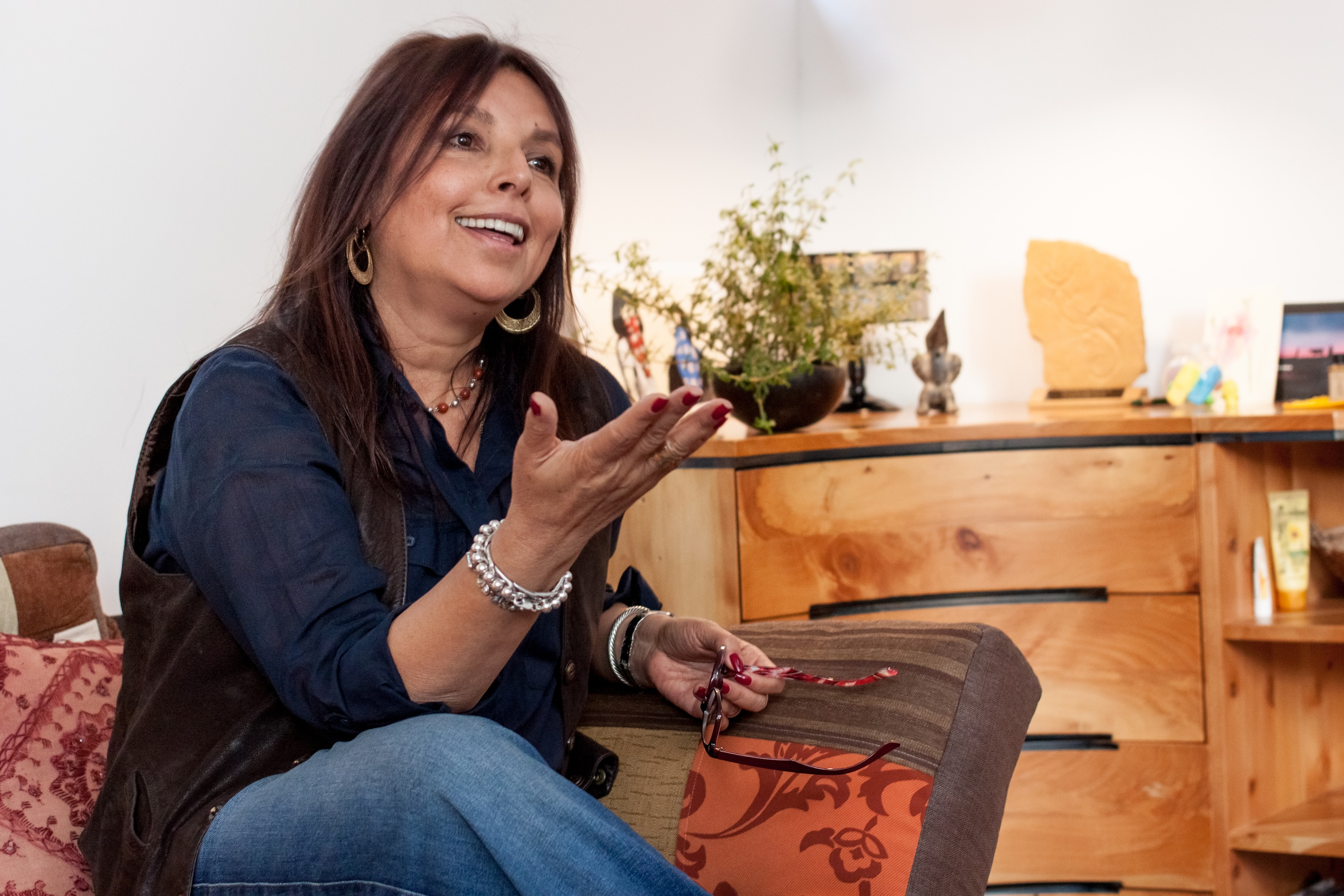 Alexandra Cardona Restrepo Foto Juan José Higuera